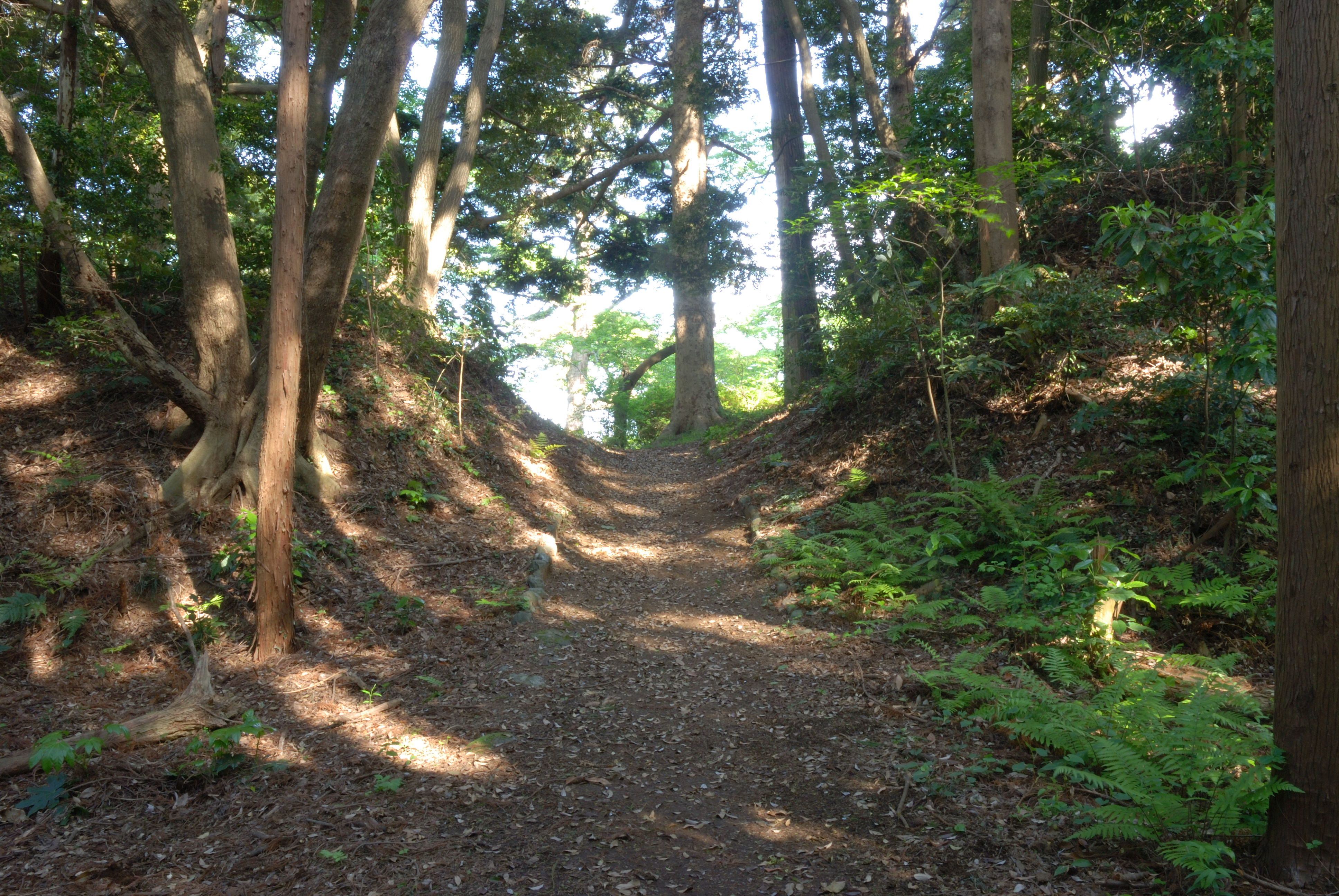 Ichikaku koguchi